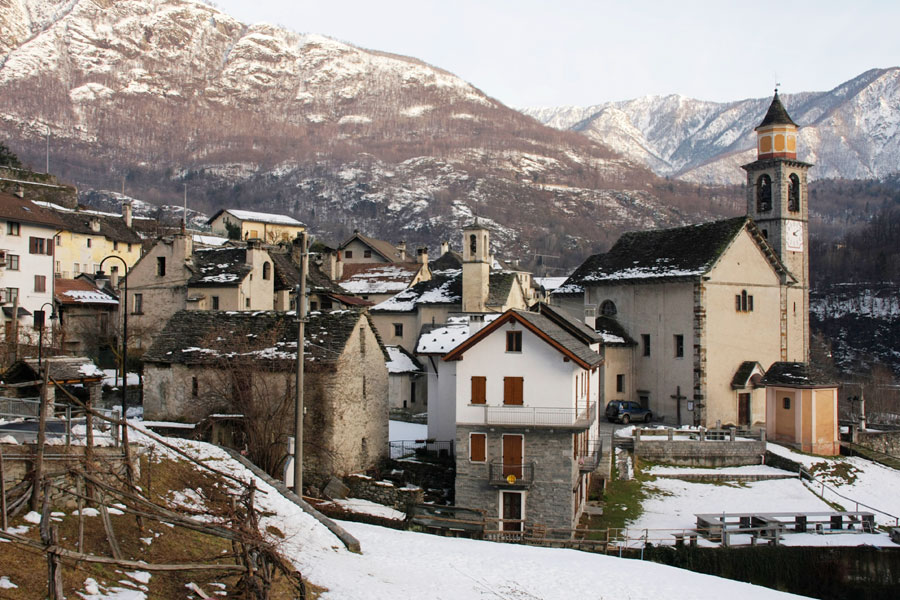 Oira, frazione di Crevoladossola